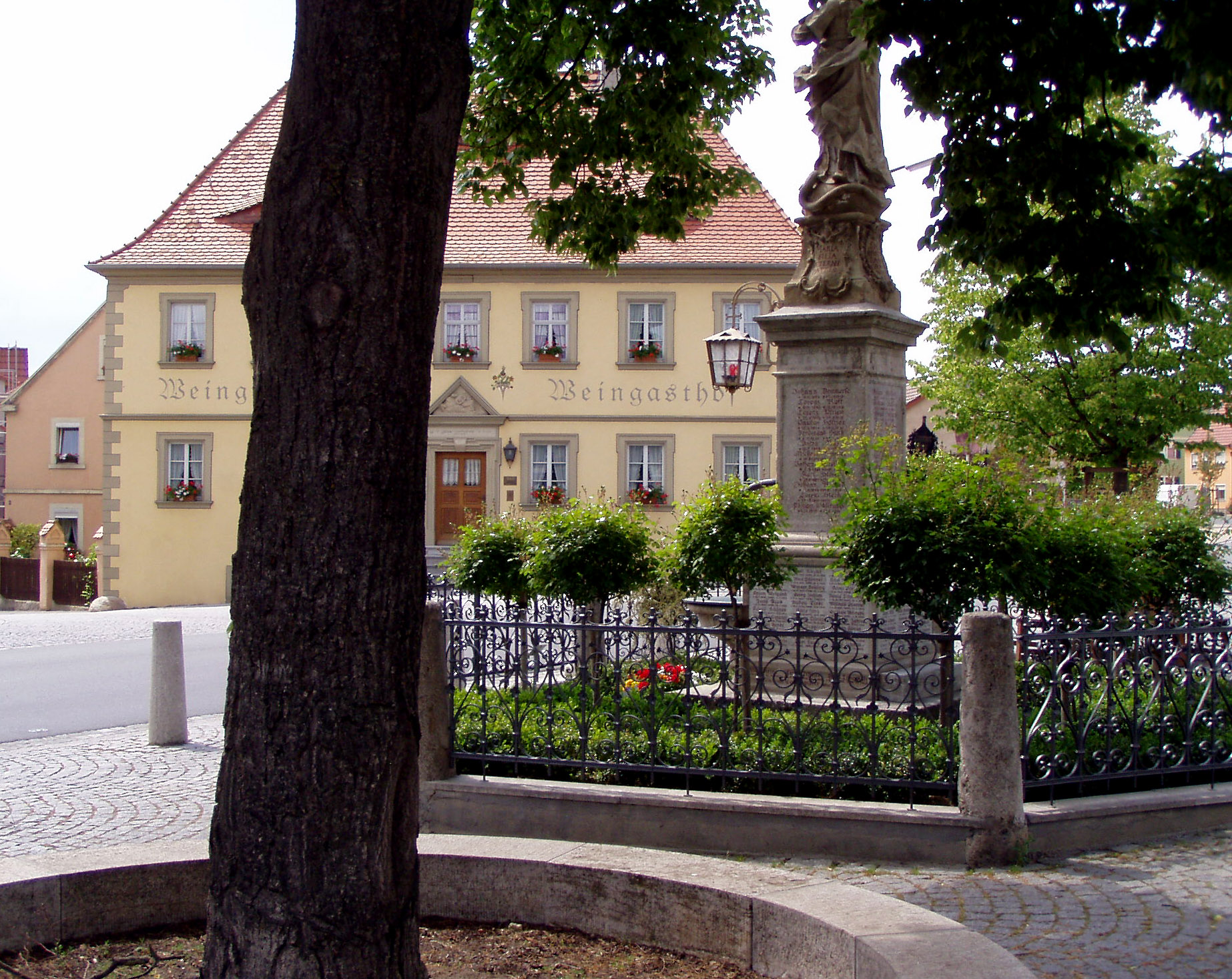 Mariensäule und Weingasthof im Zentrum von Großlangheim